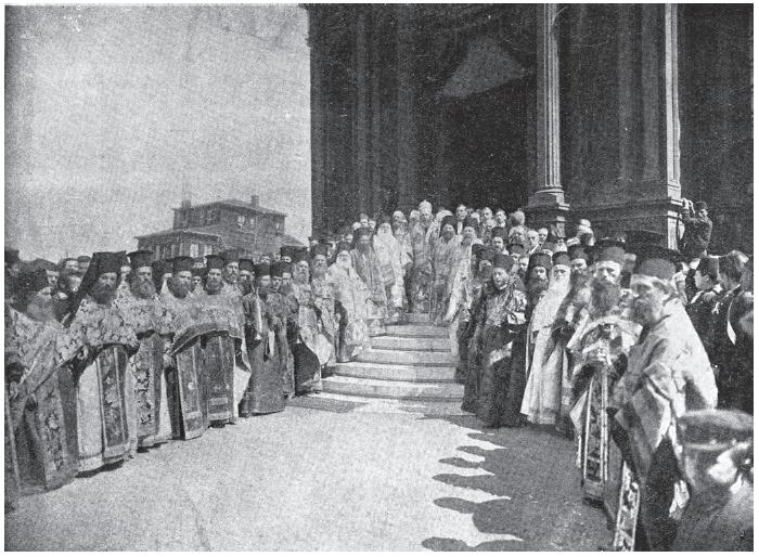 Освещаване на църквата "Свети Стефан" в Истанбул.